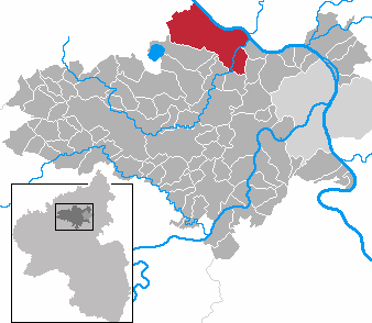 Stadt Andernach im Landkreis Mayen-Koblenz